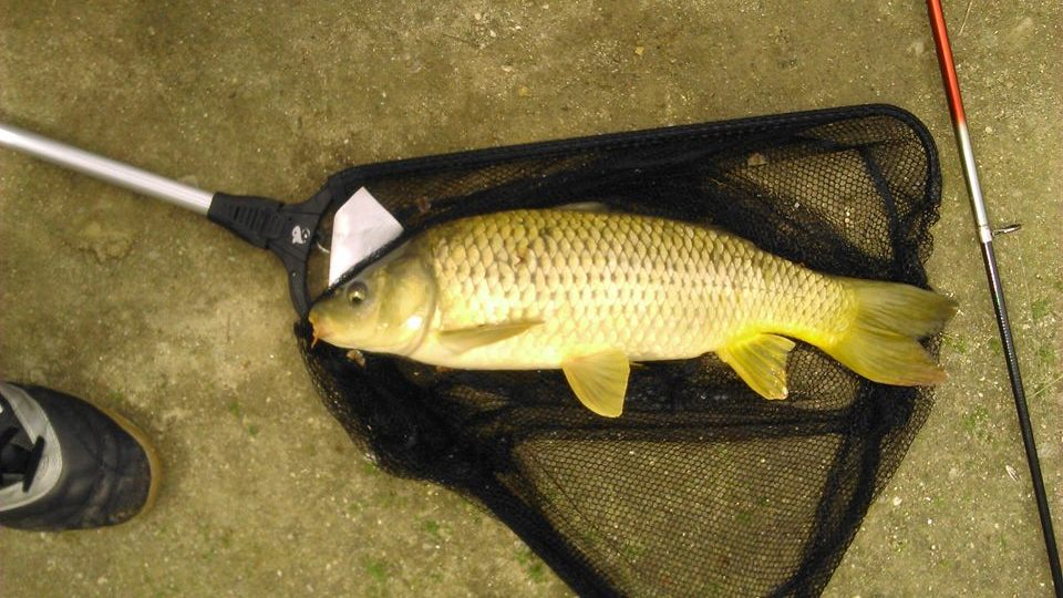 Carpa común pescada con pan flotante.